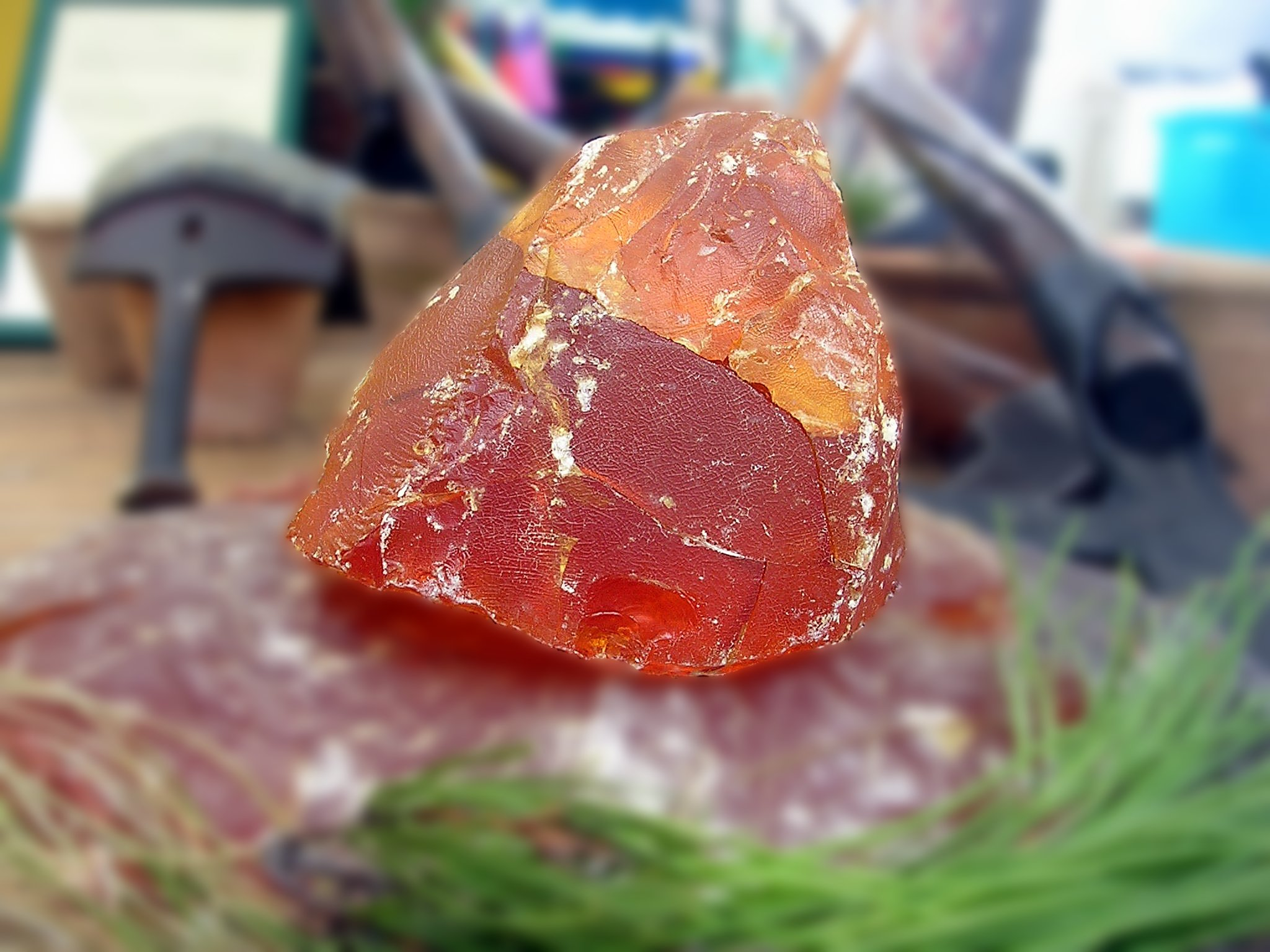 Colophane issue de la résine de pin maritime